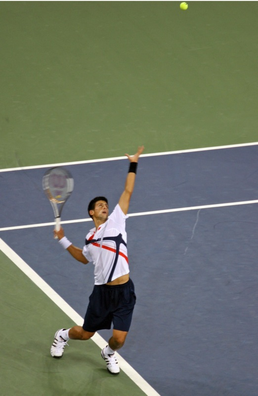 Novak Đoković at US Open 2007